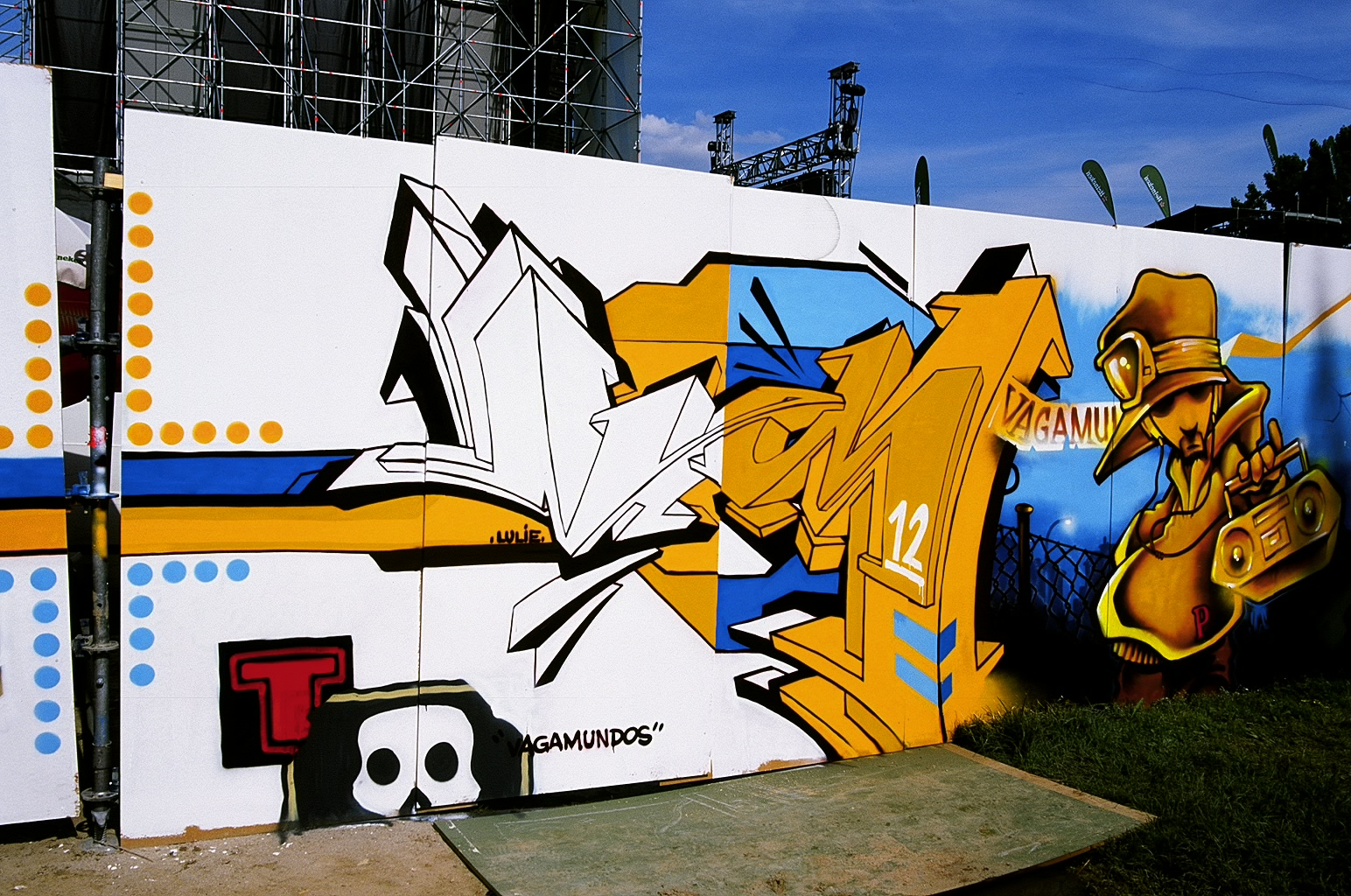 Uno de los graffitis en Festimad 2004.